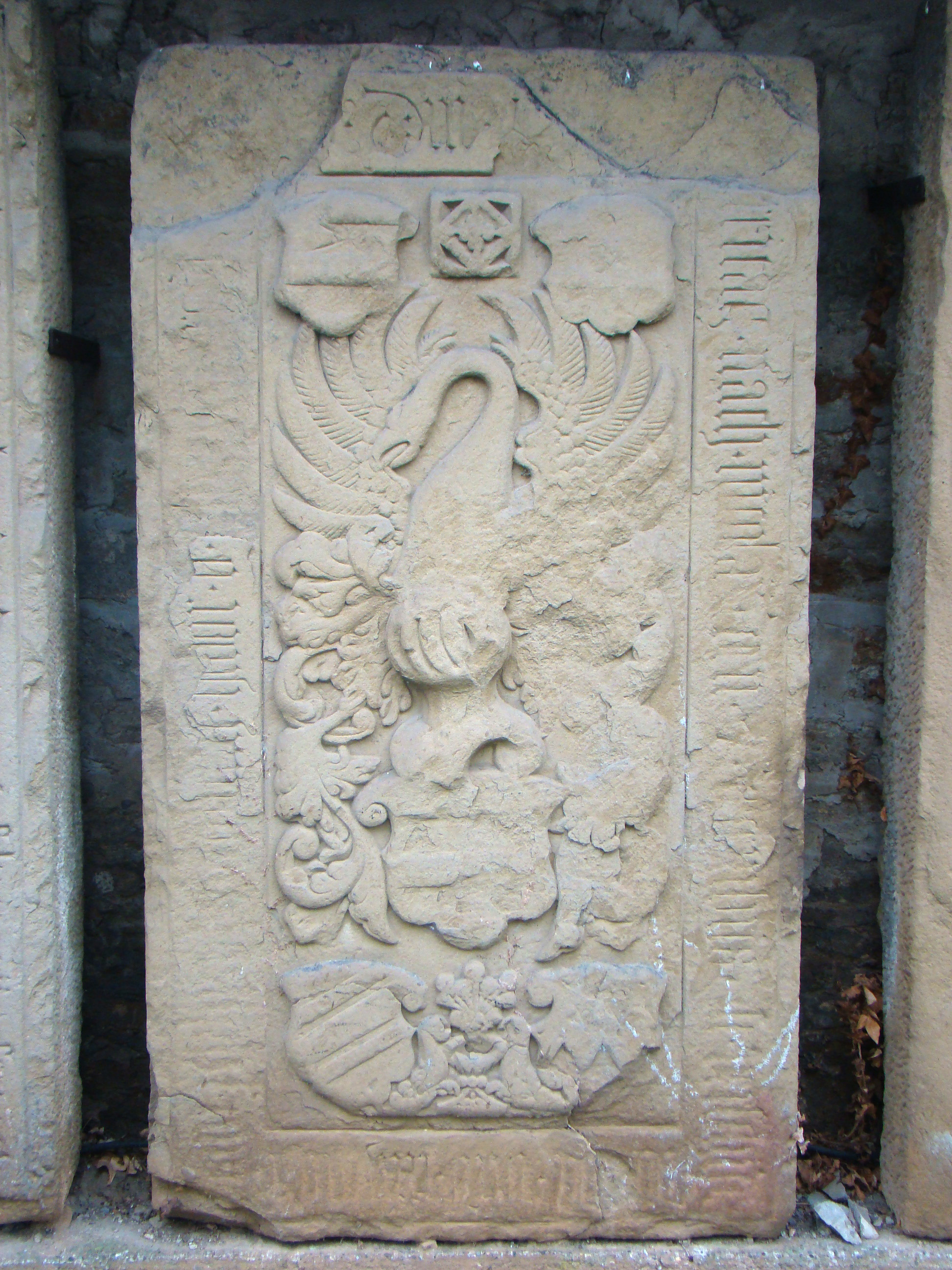 Historische Grabmale beim Unterschloss Gemmingen: Philipp(in)a von Schwar(t)z(en)berg († 1554), erste Frau von Dietrich von Gemmingen (1526–1587)